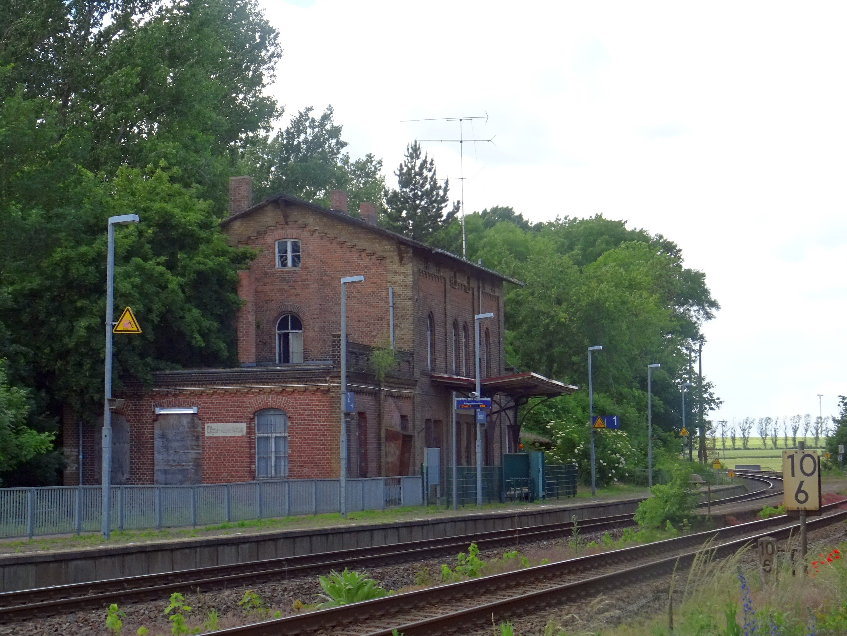 Bahnhof Biendorf, Blick von Nordosten